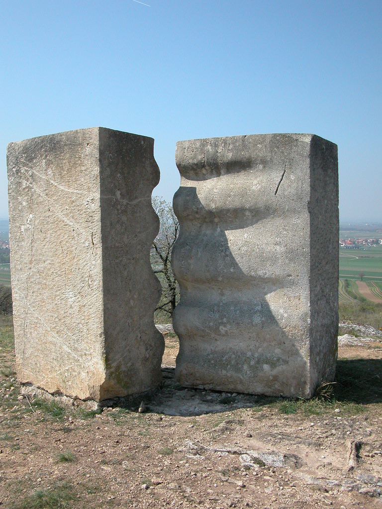 Symposion Europäischer Bildhauer, St.Margarethen, Burgenland, Austria, Skulptur von Peter Holowka, 1969, mehr info auf